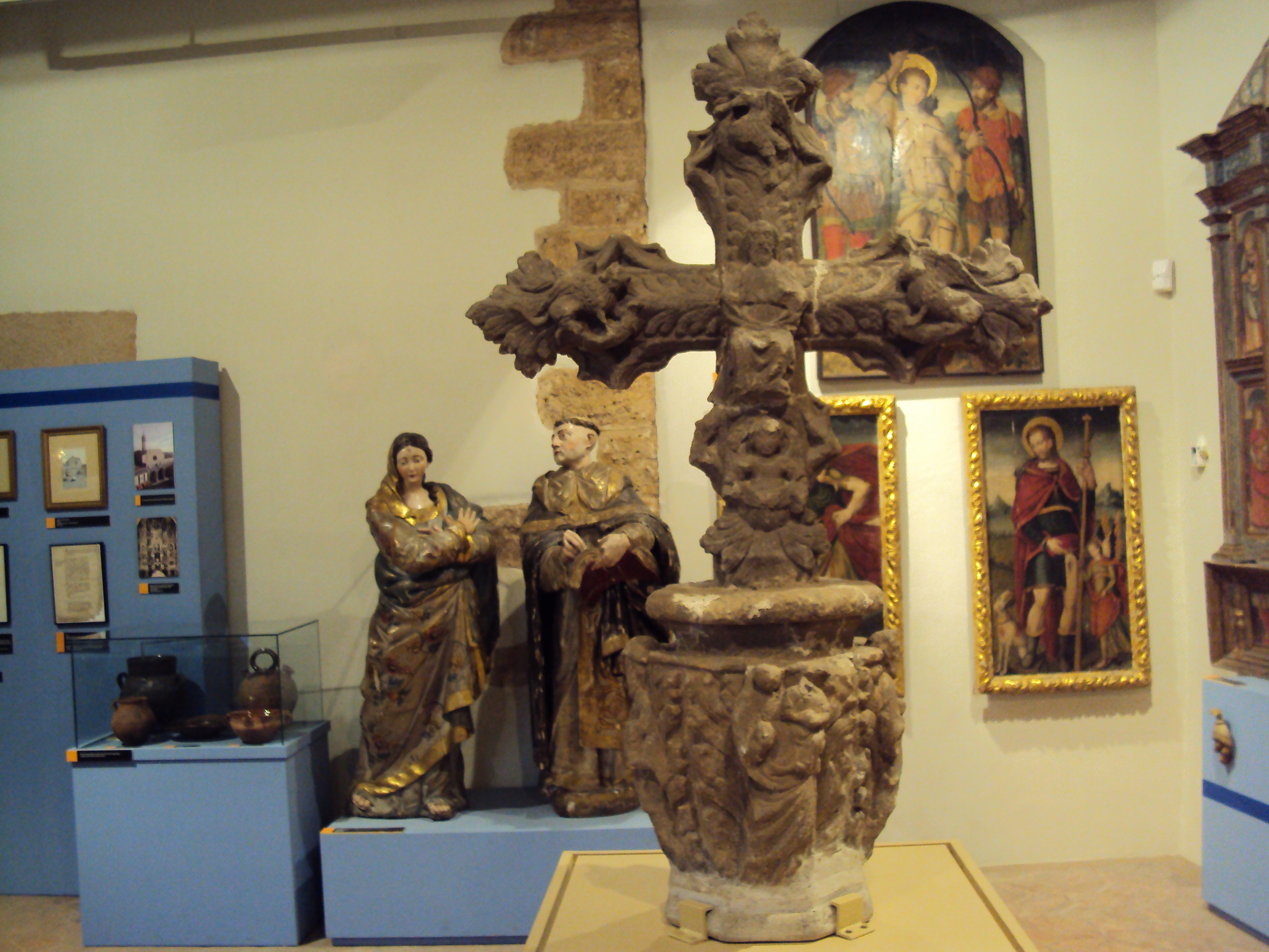 Creu de terme i font pública (Terrassa)